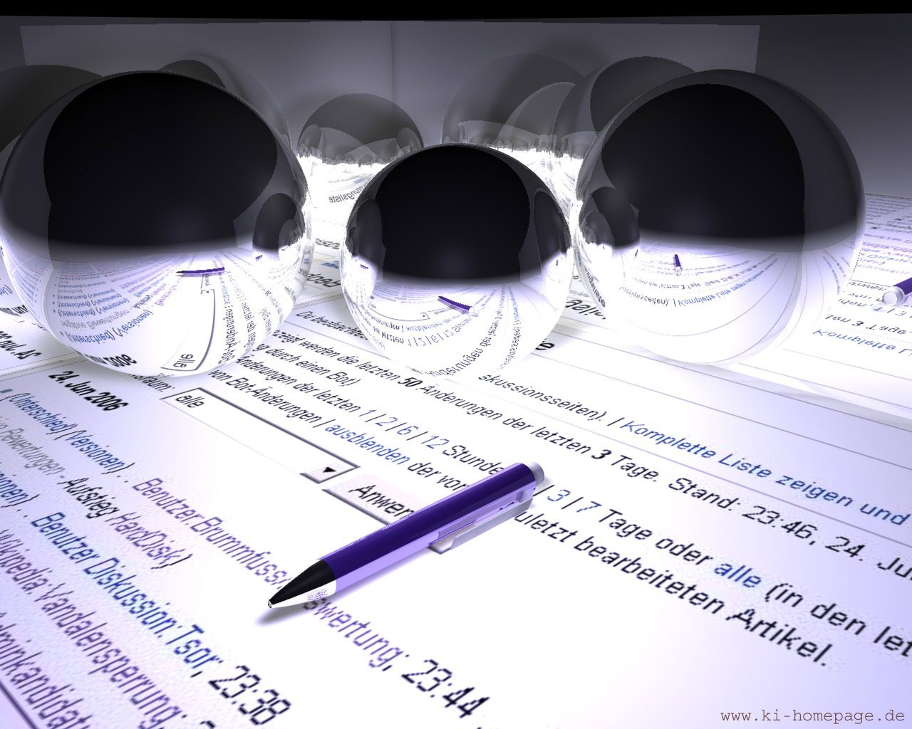 Wikipedia meets 3d in Cinema 4d